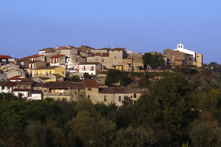 Pietrelcina - Città natale di San Pio - Centro Storico